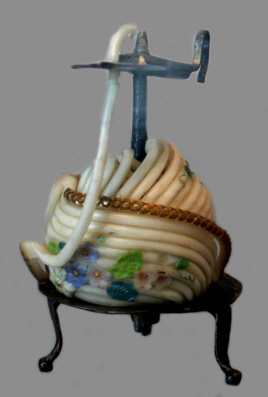 Wachsstockhalter mit Wachsstock Schmiedeeisen, Wachs; Süddeutschland, Mitte 19. Jahrhundert Landesmuseum Württemberg (Außenstelle Museum für Volkskultur in Württemberg, Waldenbuch) 1.8.; Inv. Nr. 12.124